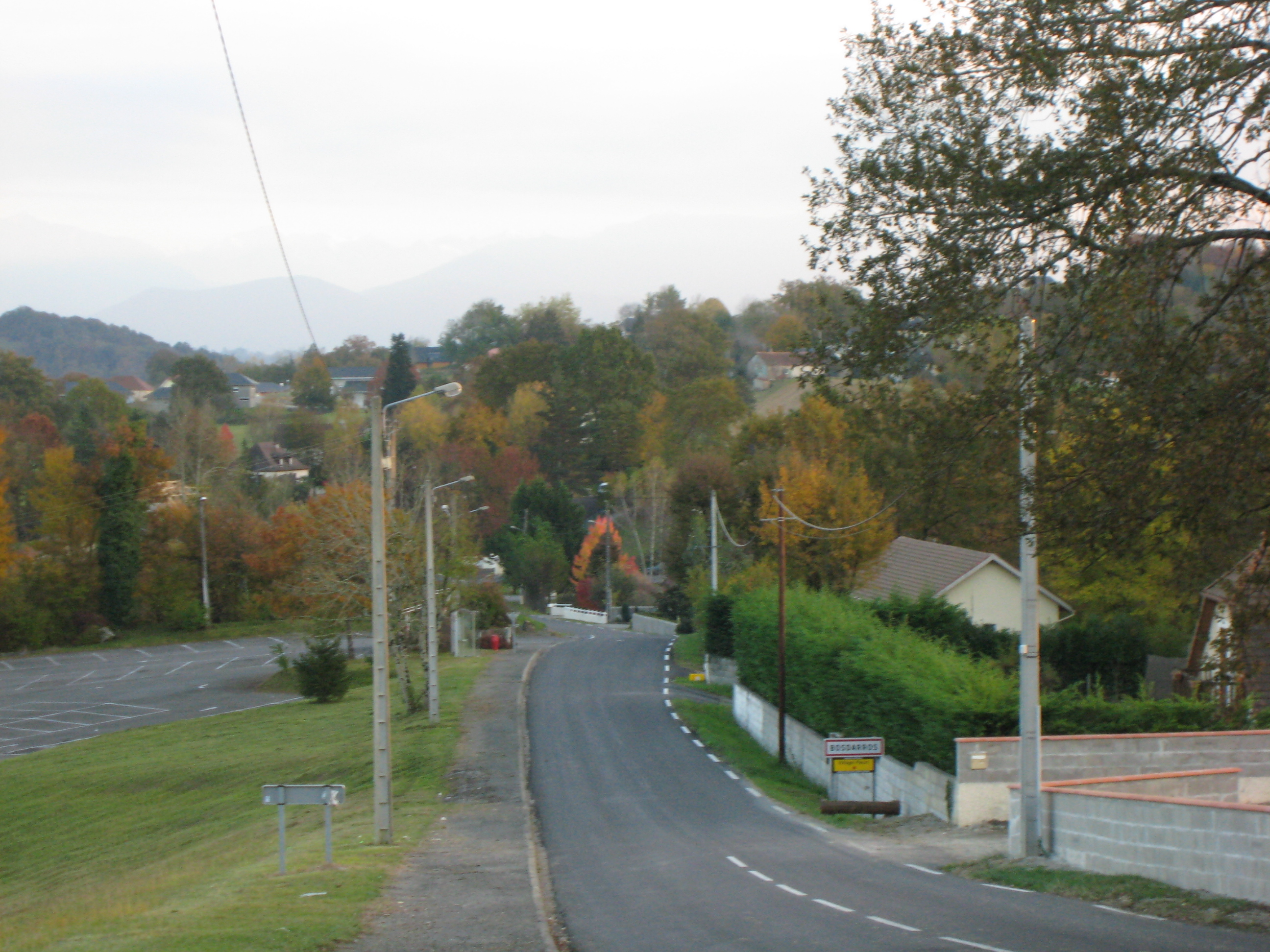 Bosdarros depuis la route de Gan (Pyrénées).